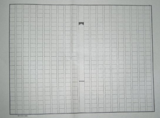 稿紙